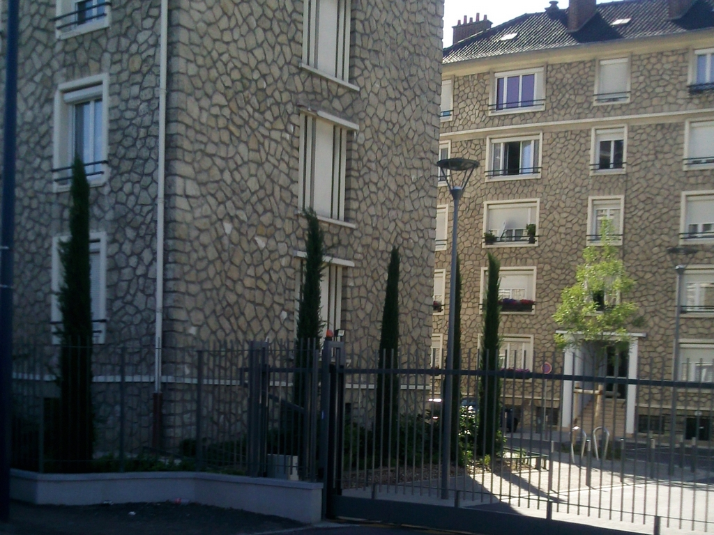 Travaux de résidentialisation de la cité Thaïs - Drancy 2012